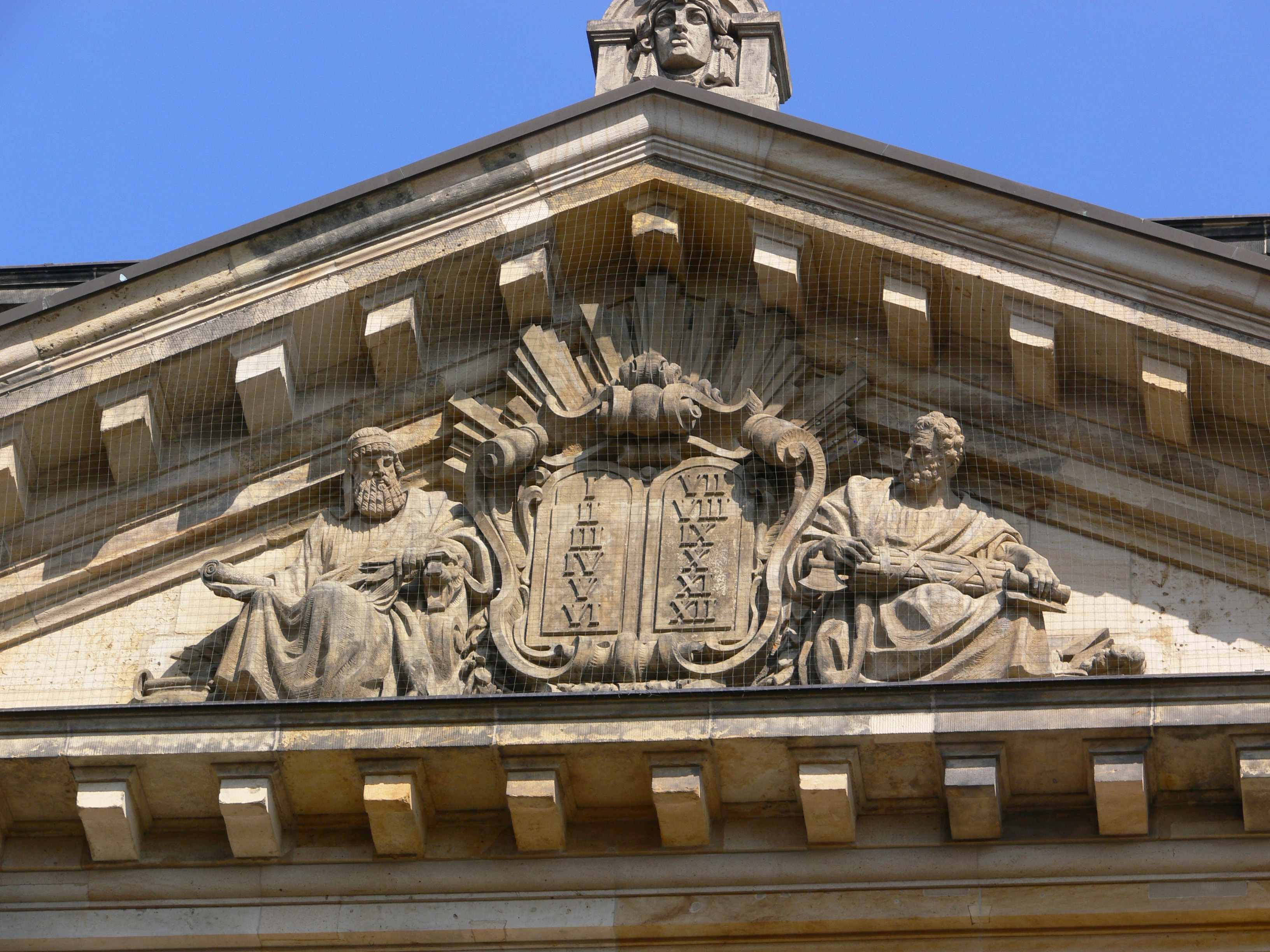 Leipzig, ReichsgerichtsgebäudeZwölftafelgesetze